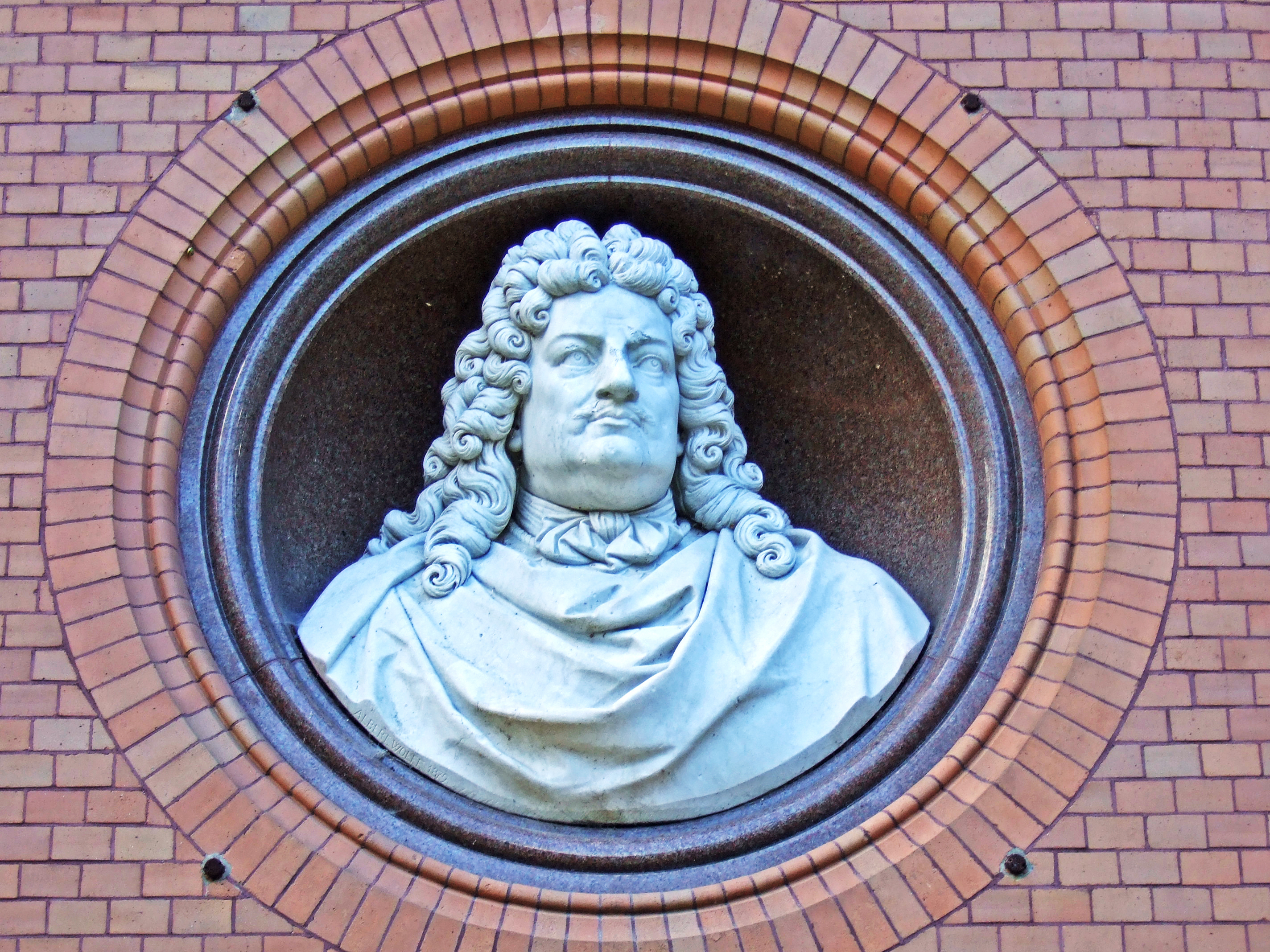 Blendnische mit Kolossalbüste des Großen Kurfürsten am Denkmal für die Schlacht bei Fehrbellin in Hakenberg. Die Büste wurde 1879 nach einem Entwurf von Andreas Schlüter in carrarischem Marmor in der Bildhauerwerkstatt von Albert Wolff geschaffen.